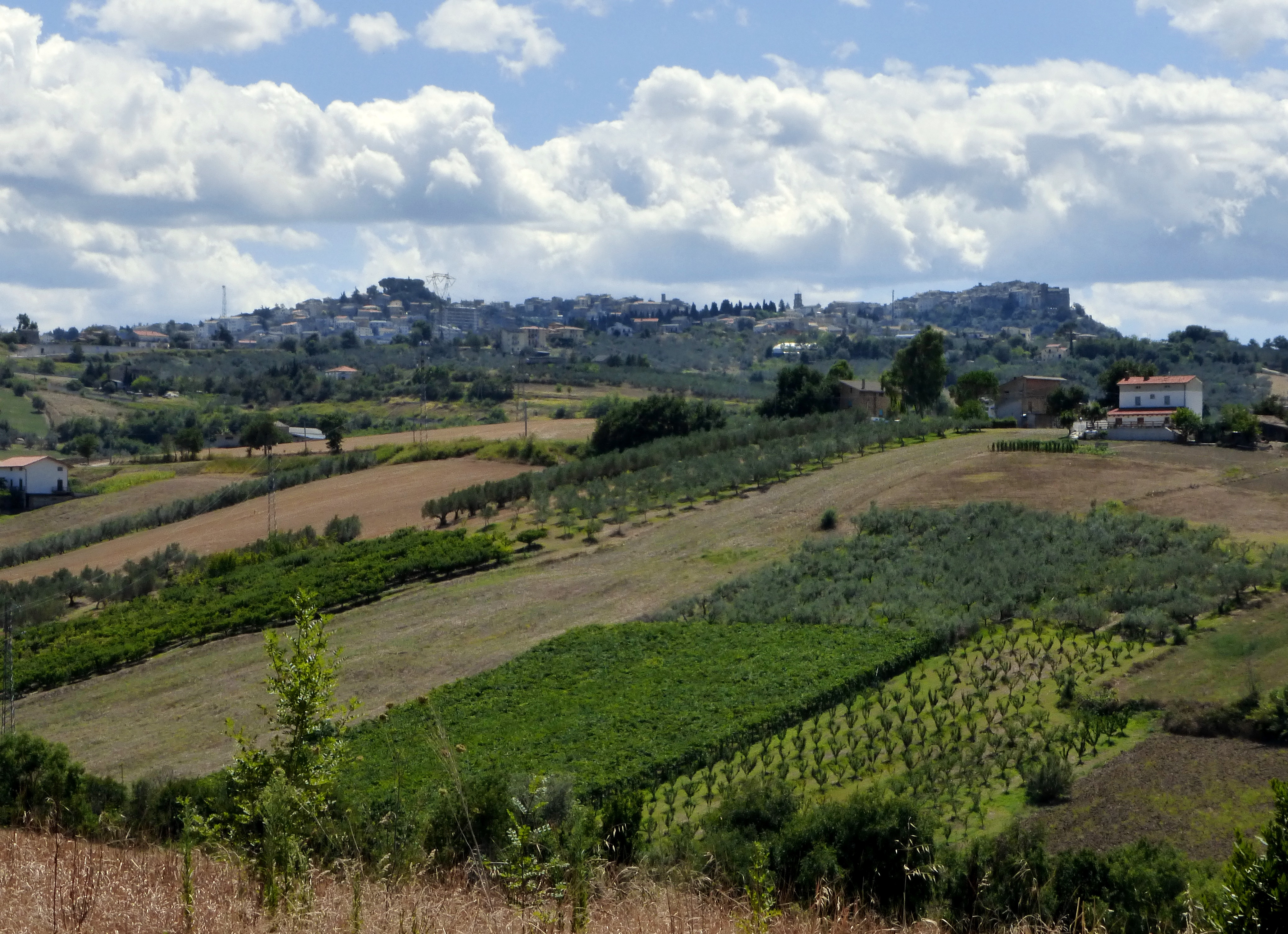 Veduta di Atessa, Chieti.